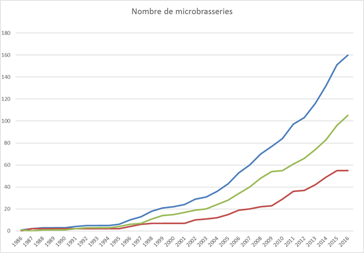 Évolutions du nombre de microbrasseries qébécoises, classé par type de permis.